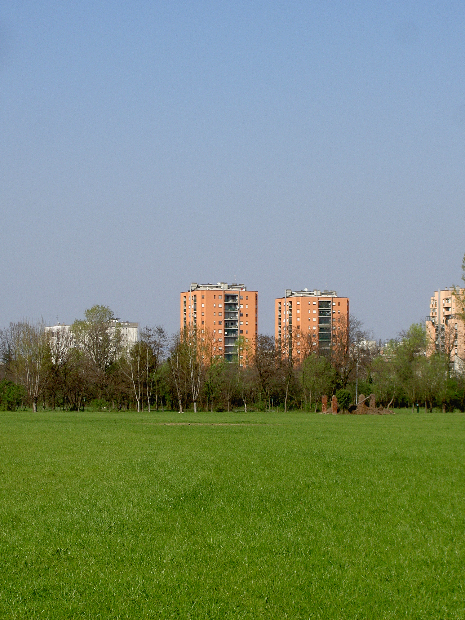 Parco delle Cave di Milano, lato di via Rossellini, Quarto Cagnino, nel 2012